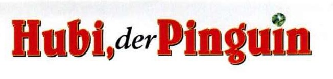 Logo von Hubi, der Pinguin